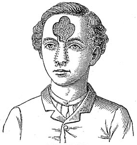 Rhinoplastik